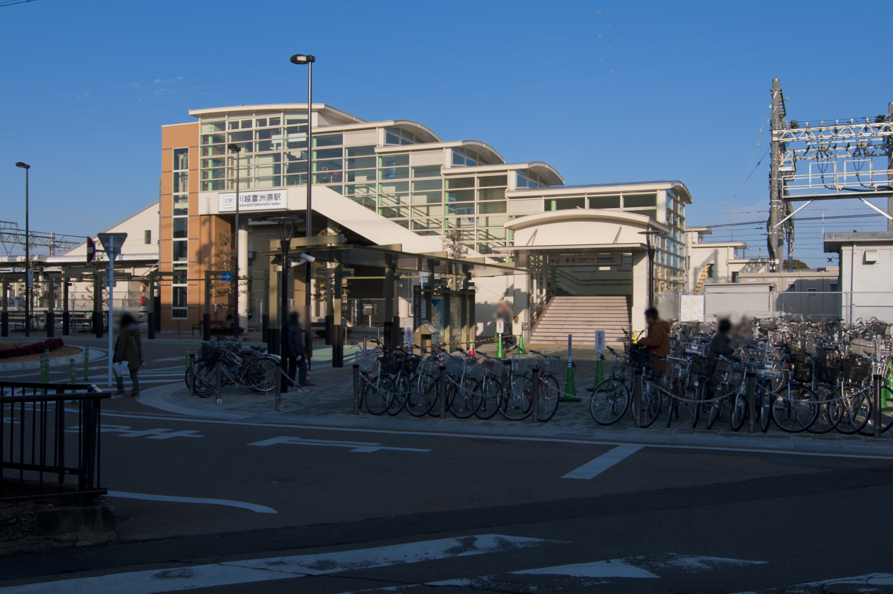 近畿日本鉄道名古屋線川越富洲原駅駅舎